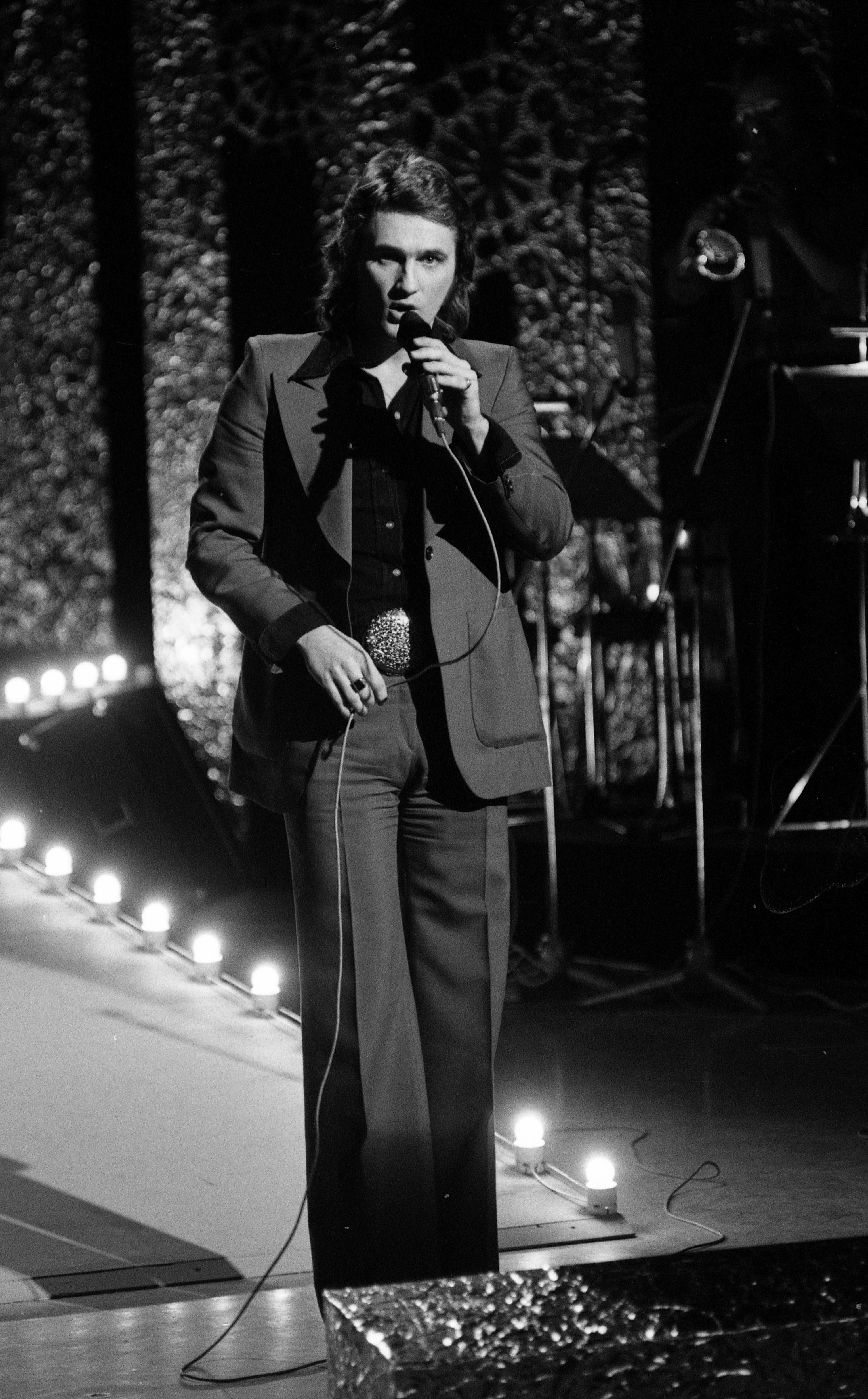 Melodi Grand Prix, norsk finale i TV-studio 1 NRK, 1974. Fra generalprøven. Foto: Petter R. Iversen. Arkivref.: PA-0797_U_7631_014_008